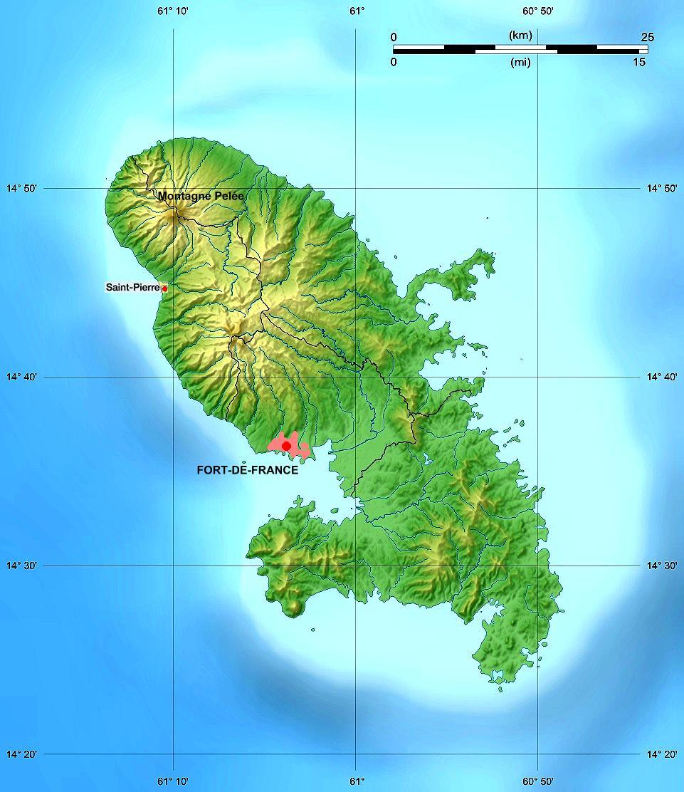 Reliefkarte von Martinique